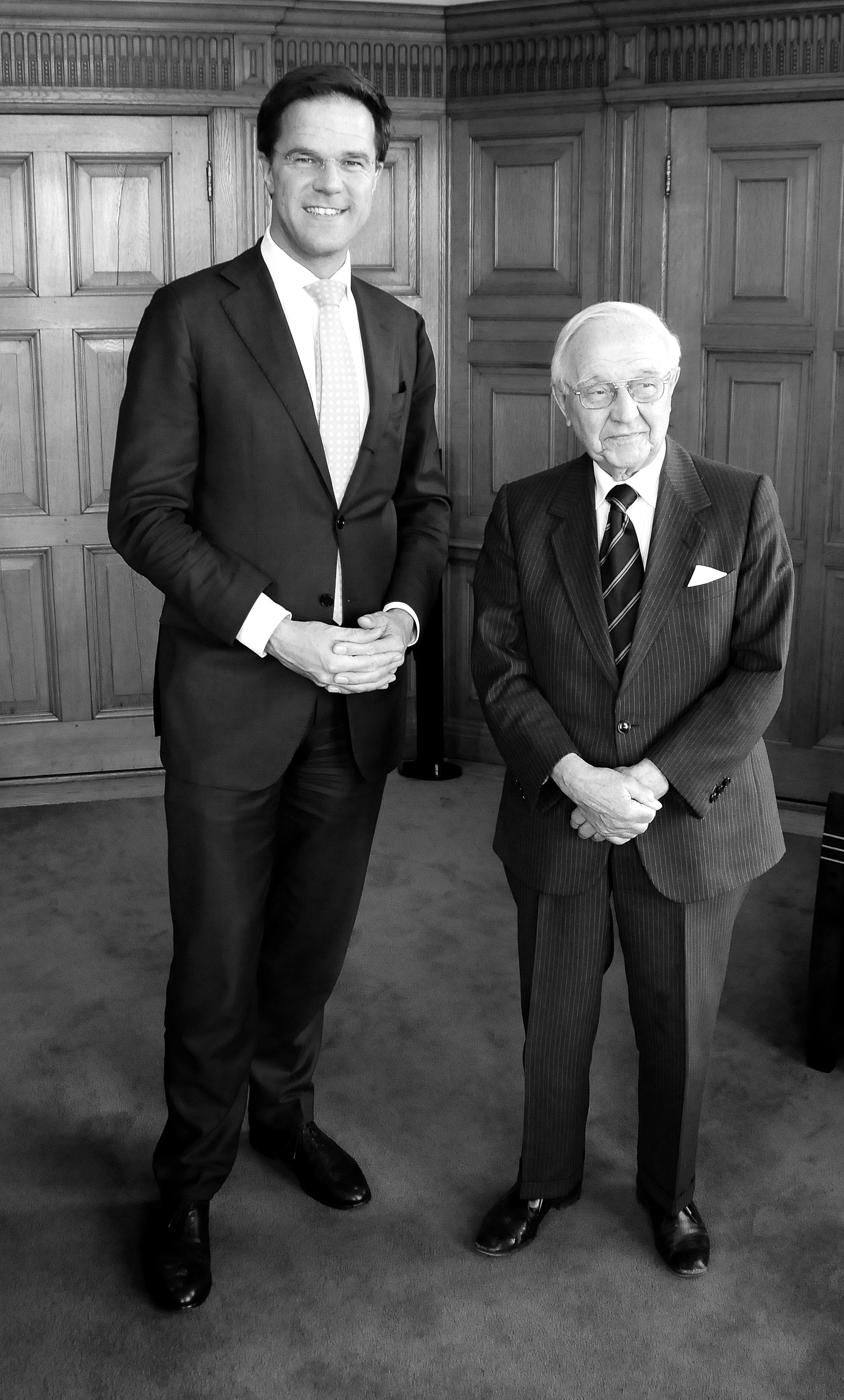 Minister-president Rutte ontvangt oud-premier De Jong in het Torentje om ervaringen uit te wisselen.